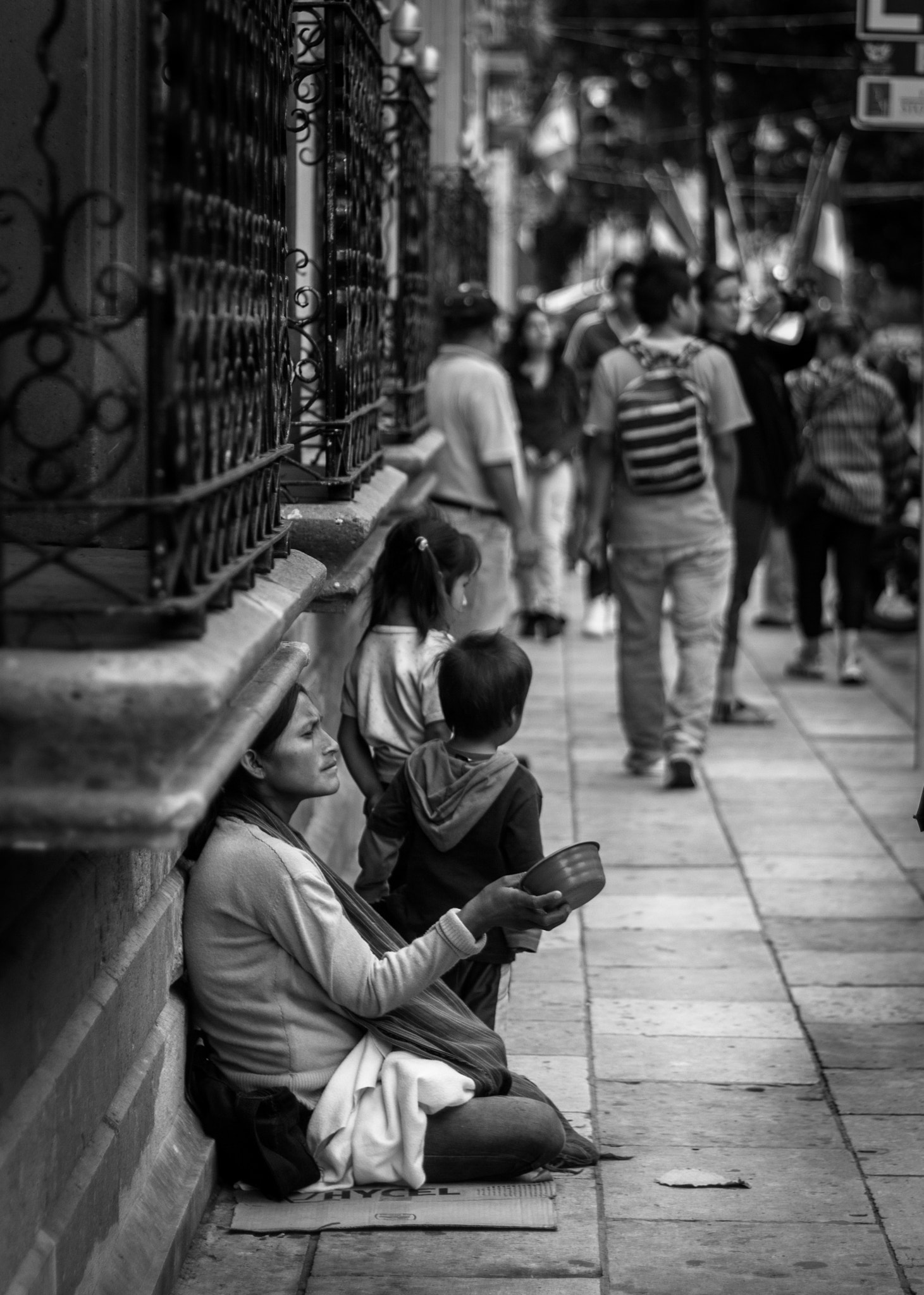 500px provided description: Pobreza En Las Calles [#people ,#mexico ,#calle ,#gente ,#pobreza ,#oaxaca ,#street photography]